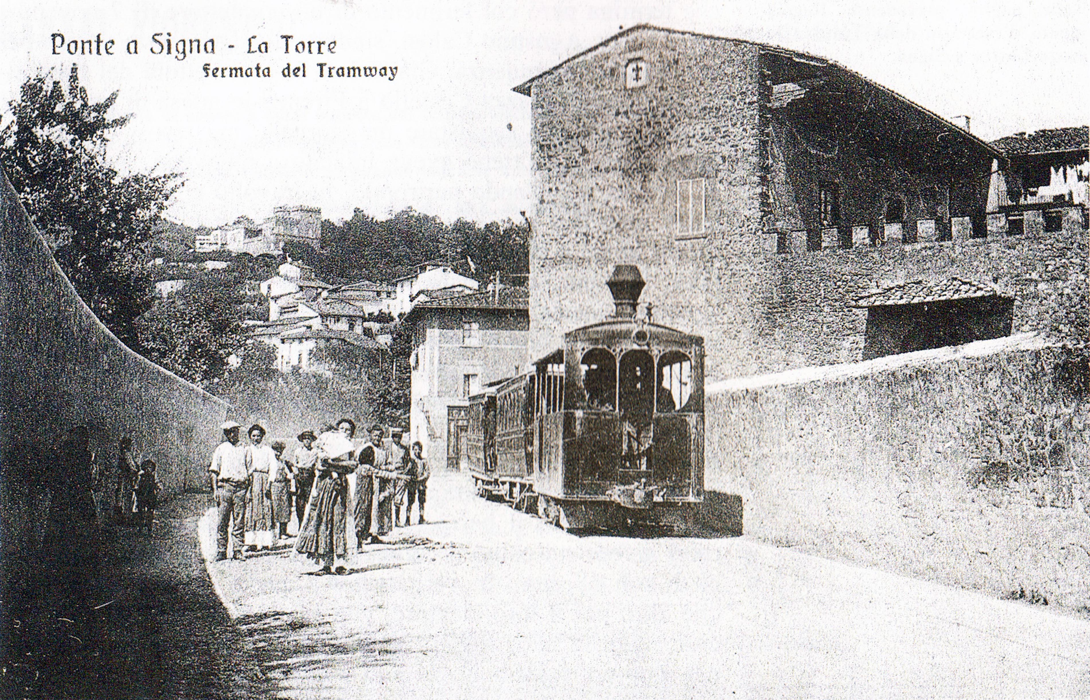 Tramvia Firenze-Signa